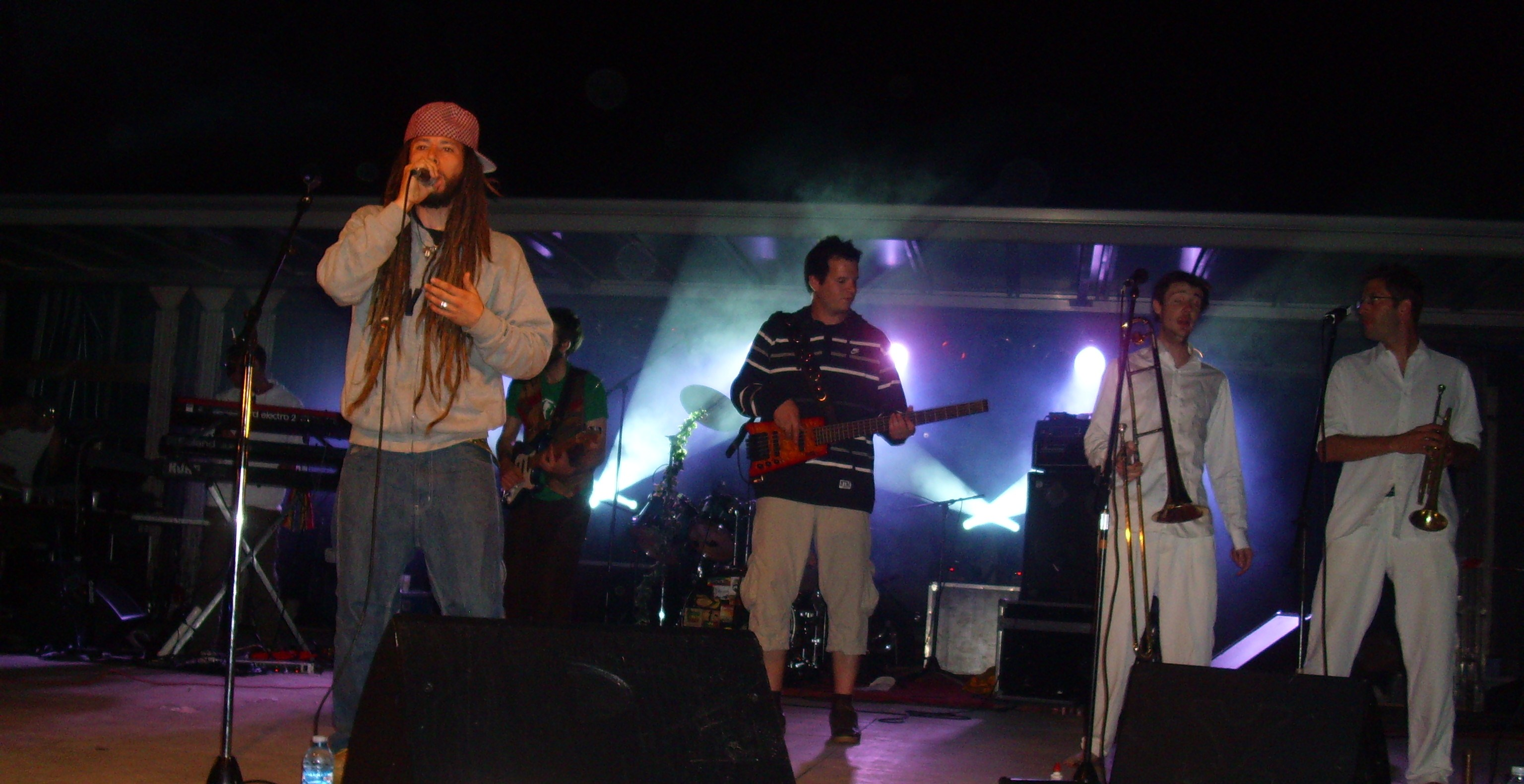 Danakil lors du festival de Verjux (71)